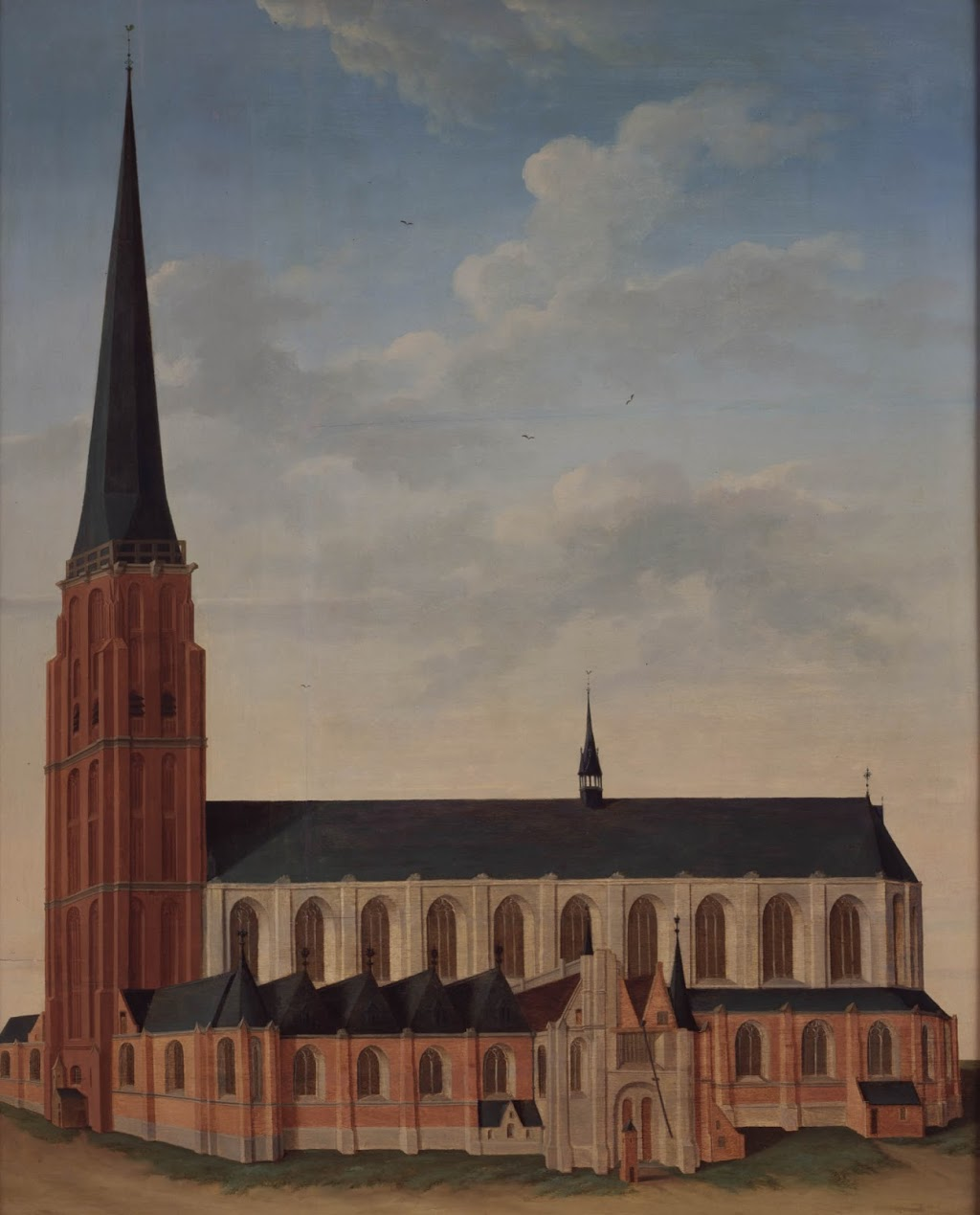 Schilderij met een voorstelling van de Pieterskerk in Leiden. De in 1512 ingestorte toren van de kerk is aan de linkerzijde afgebeeld. Voor de kerk staan enkele huisjes. In de lucht vliegen vier vogels. Niet gesigneerd. Circa 1515. Schilderij zit in een houten lijst.